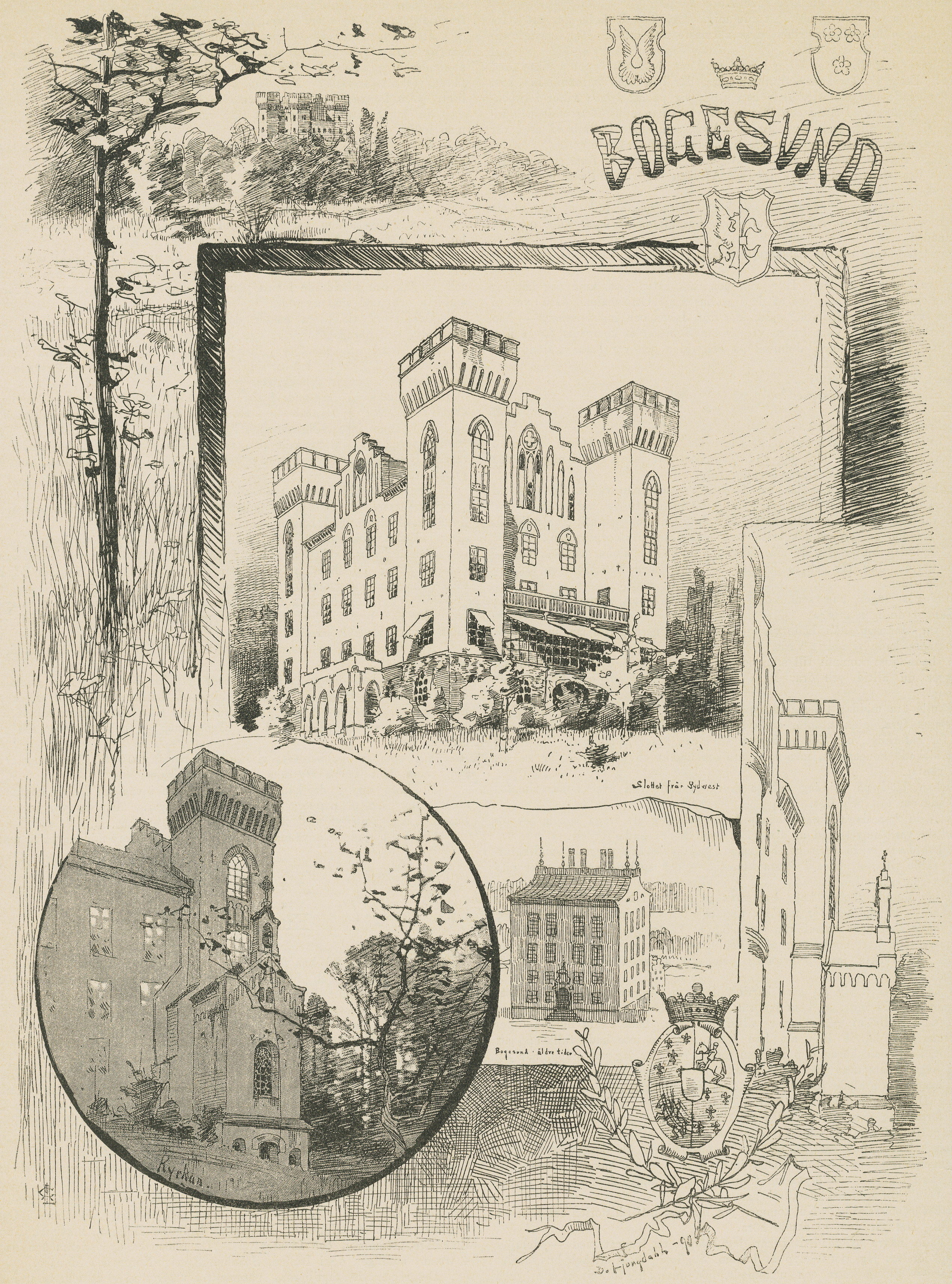 Bogesunds slott